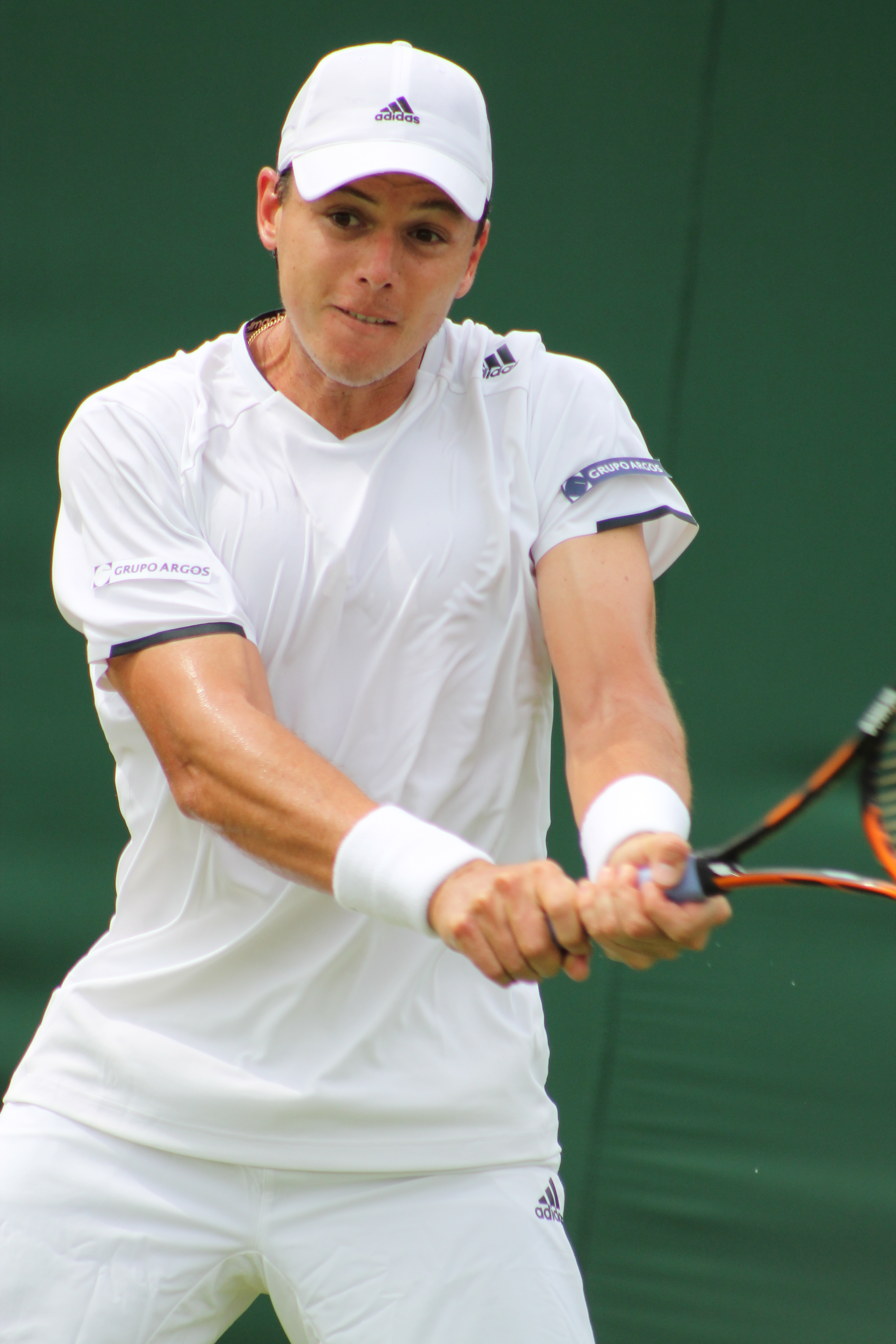 Gonzalez A. WM14 (25)